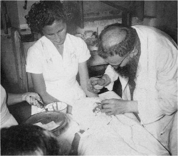 Frei Alberto pára sua ambulância para atender a um doente no “sertão”.